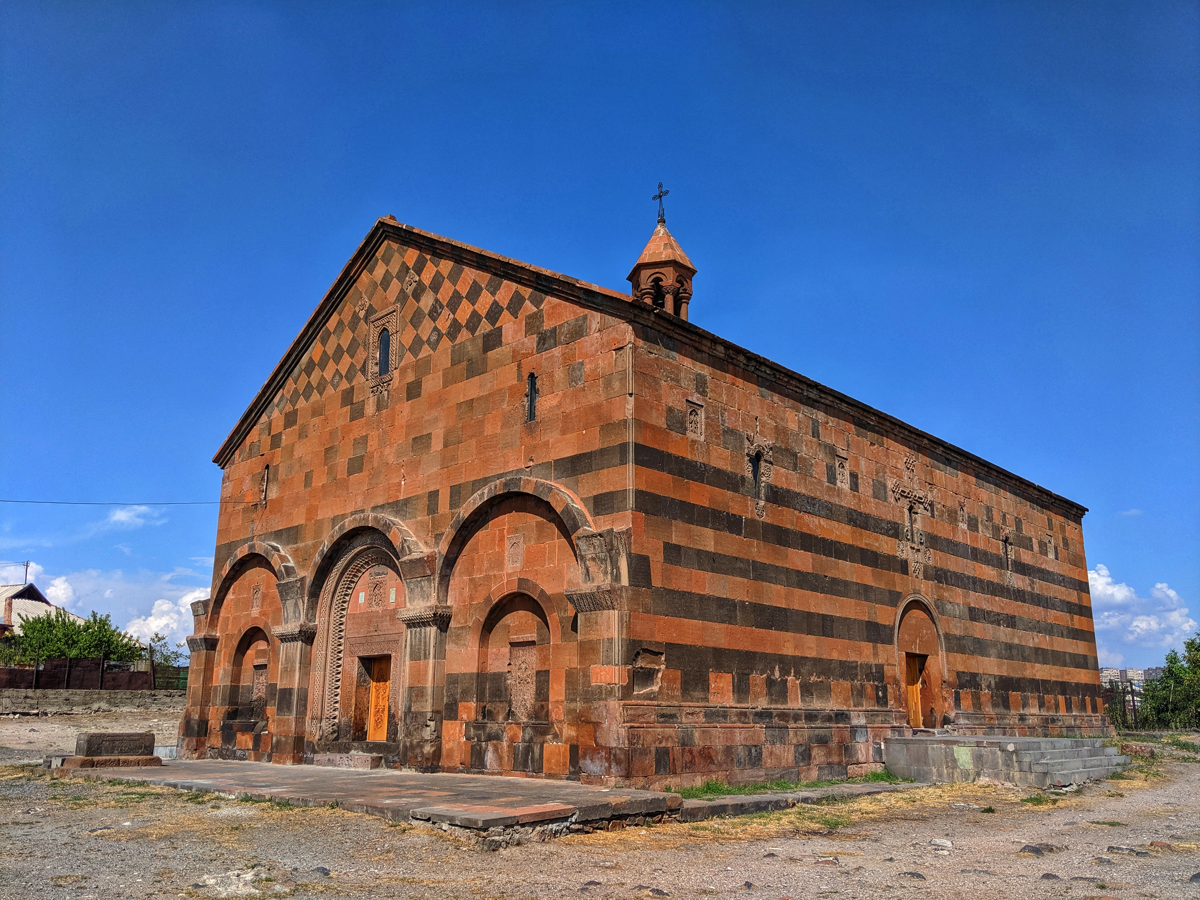 Քանաքեռի Սուրբ Աստվածածին եկեղեցի, Սեպտեմբերի 5, 2019 12/5